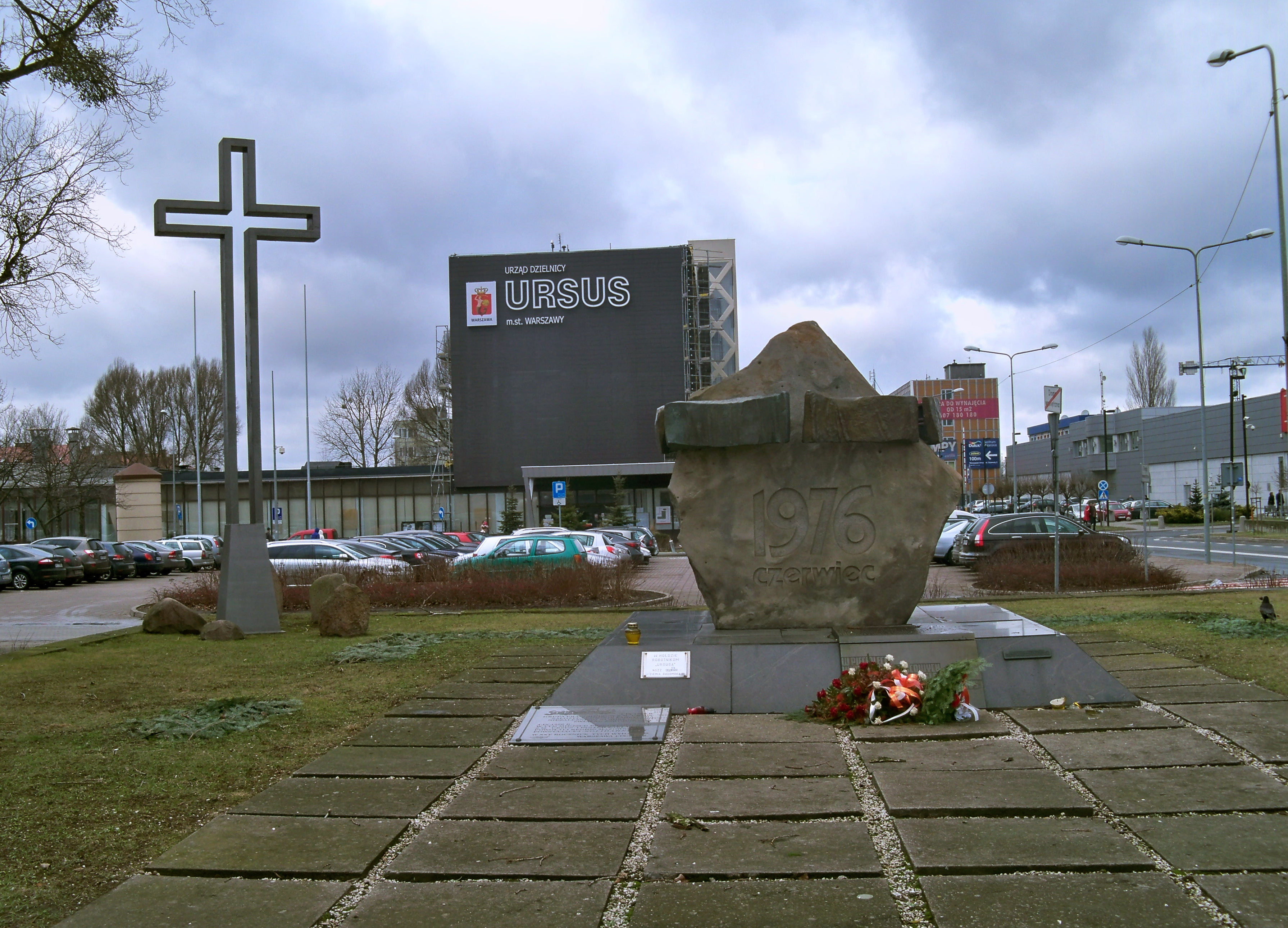 Głaz przed urzędem dzielnicy Ursus w Warszawie upamiętniający protesty z czerwca 1976